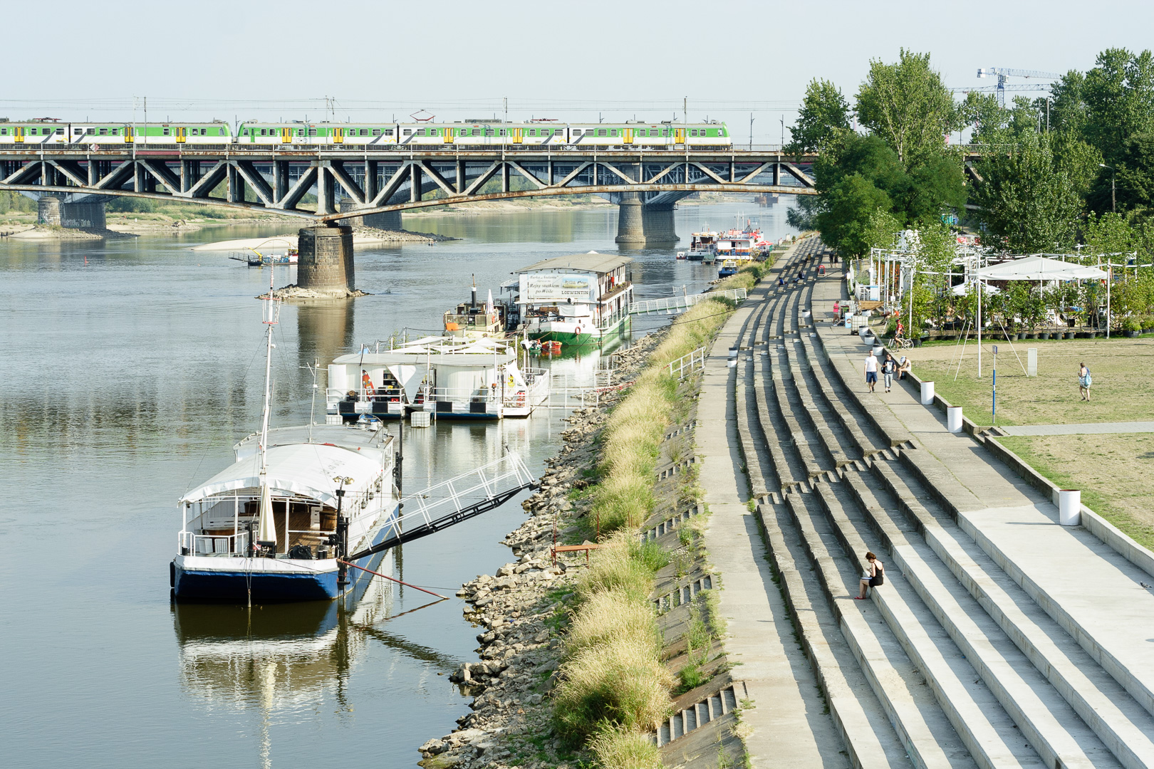 Bulwary wiślane na Powiślu w Warszawie. W głębi most kolejowy (średnicowy), dalej Most Poniatowskiego.